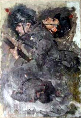 „Infanterişti la atac” de Nicolae Grigorescu, ulei pe pânză. Schiţa a fost realizată după încheierea războiului de independenţă şi folosită ulterior pentru realizarea lucrării „Atacul de la Smârdan”. Muzeul Militar Național din București.